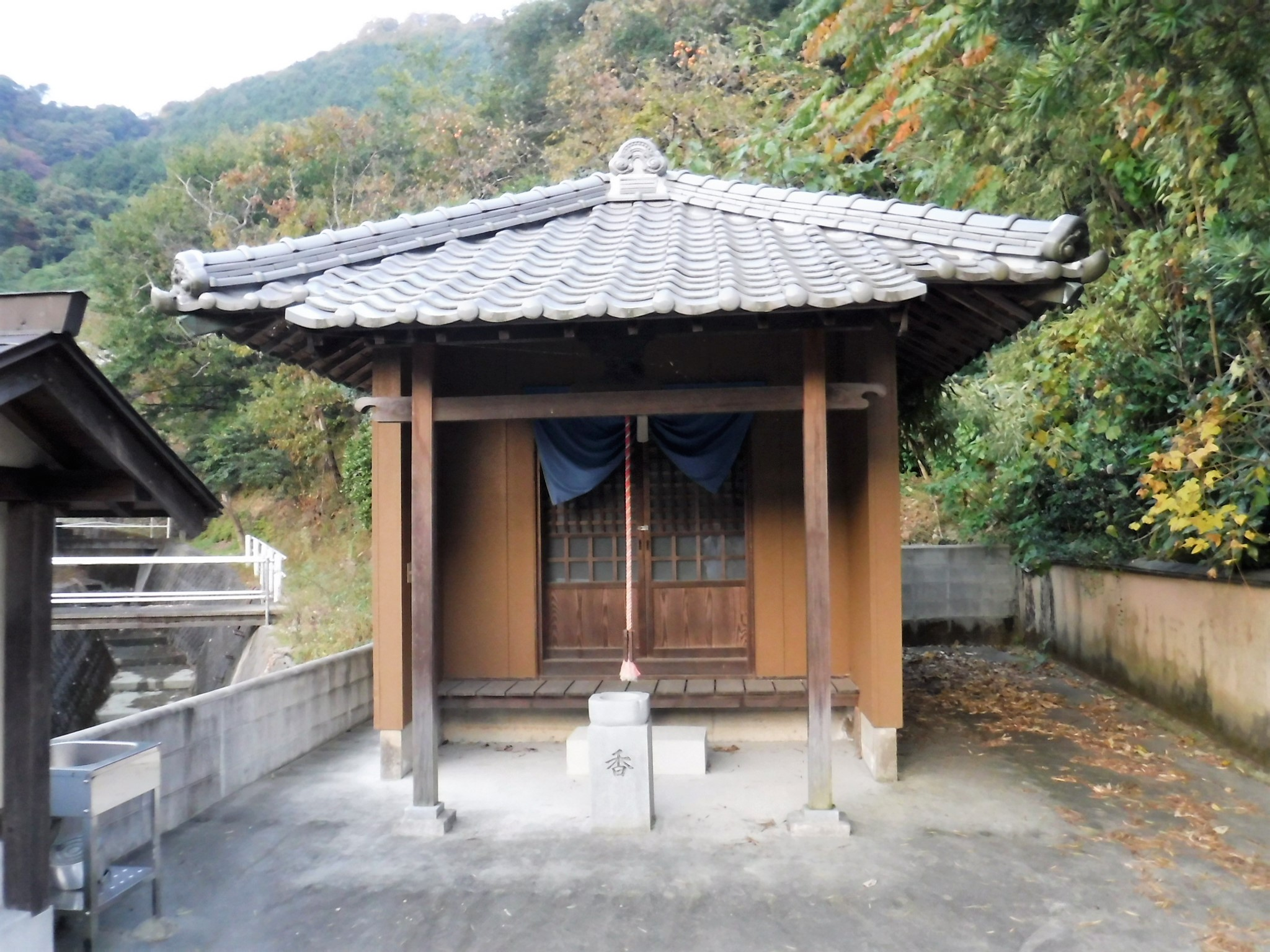 愛媛県西条市黒瀬乙。愛媛県のお堂。 33°53'09.0"N 133°10'26.8"E 33.885821, 133.174107